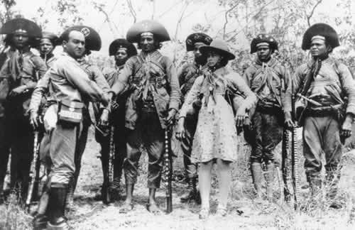 Retratos do cangaço - O encontro de Abrahão com o bando de Virgulino, em foto tirada pelo cangaceiro Juriti. Da esquerda para a direita: Vila Nova, não identificado, Luís Pedro, Benjamin Abrahão (à frente), Amoroso, Lampião, Cacheado (ao fundo), Maria Bonita, não identificado, Quinta-Feira